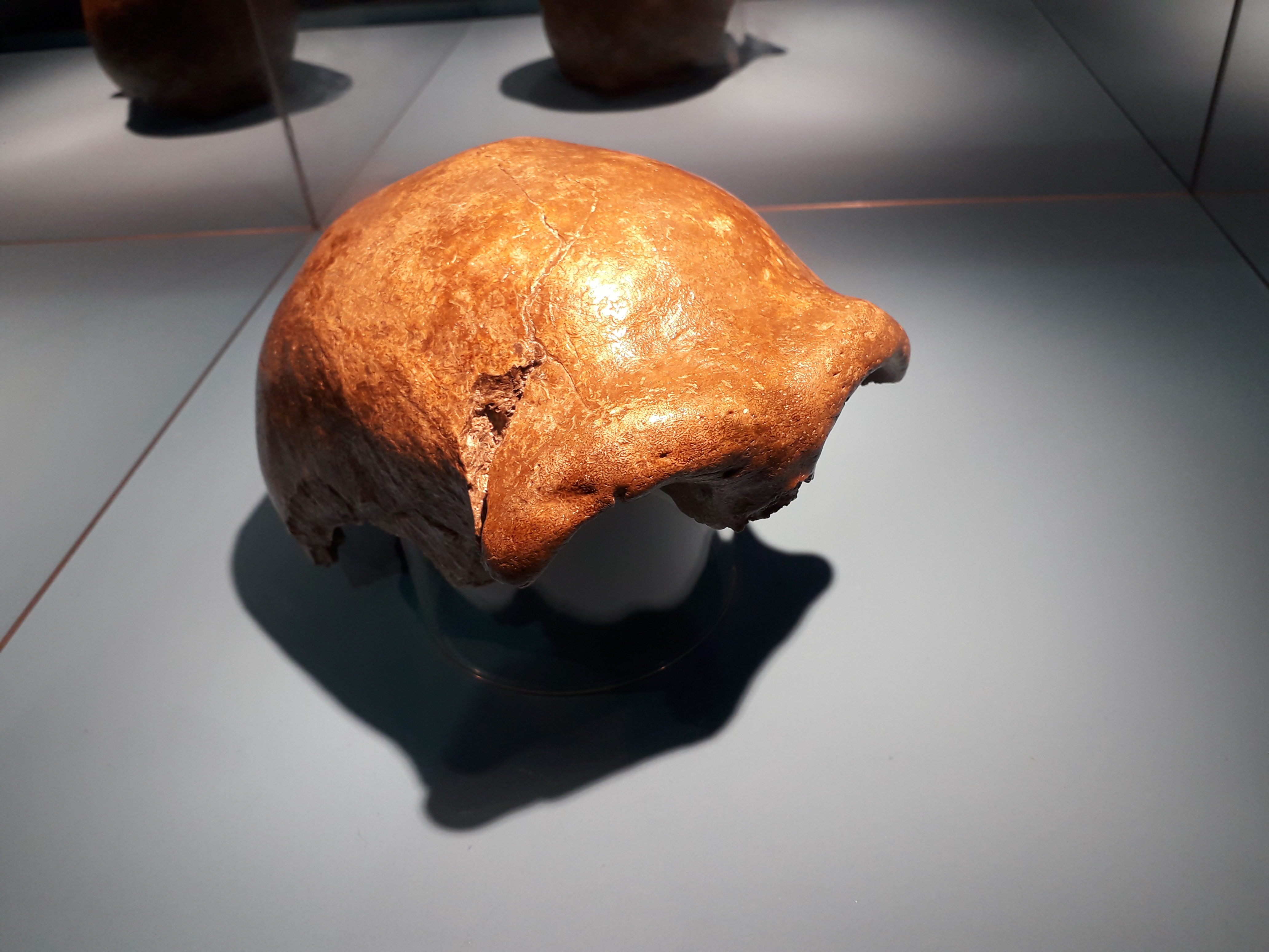 Calotte crânienne découverte dans la vallée de Néander. Os fossile. Site de la vallée de Néander. 42 000 BP. Type de l'espèce "Homo neanderthalensis". Objet conservée à LVR-LandesMuseum Bonn, en Allemagne. Photographié à l'exposition "Néandertal, l'expo" au musée de l'Homme à Paris en avril 2018.